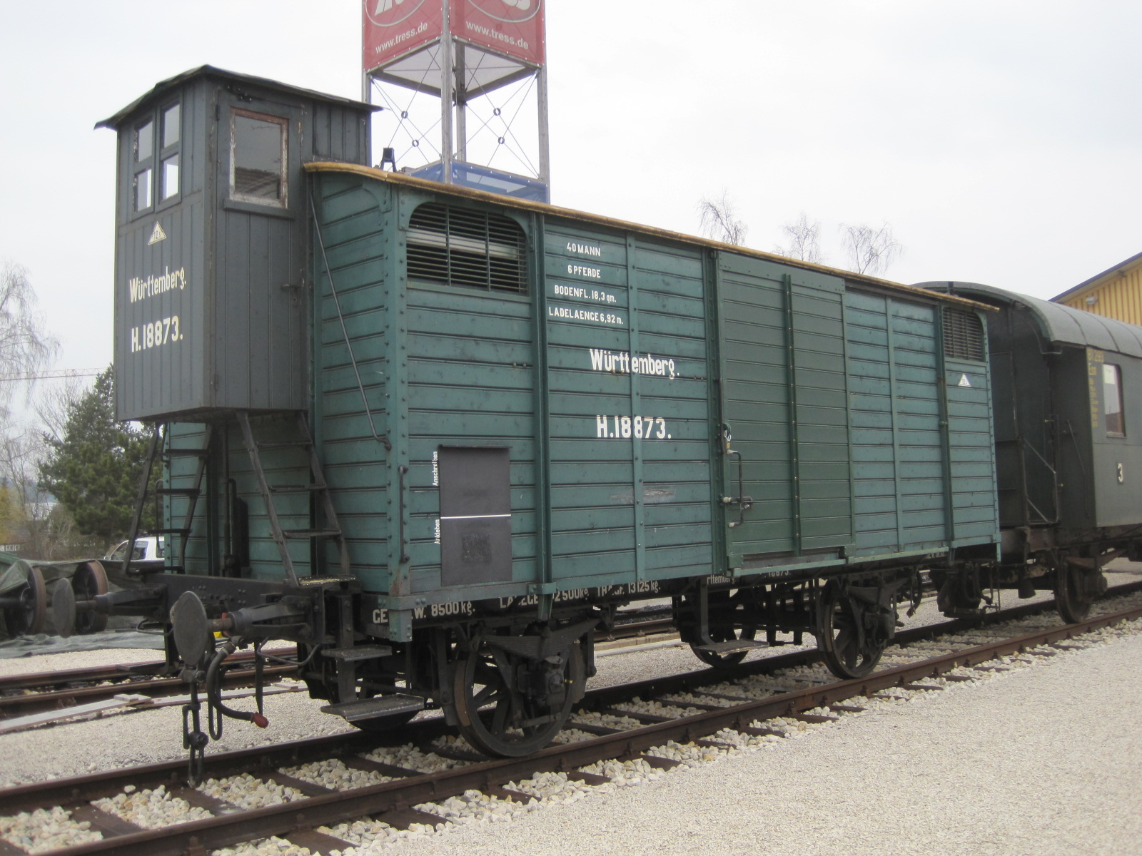 Württemberger Güterwagen mit Bremserhäuschen im Bahnhof Münsingen.